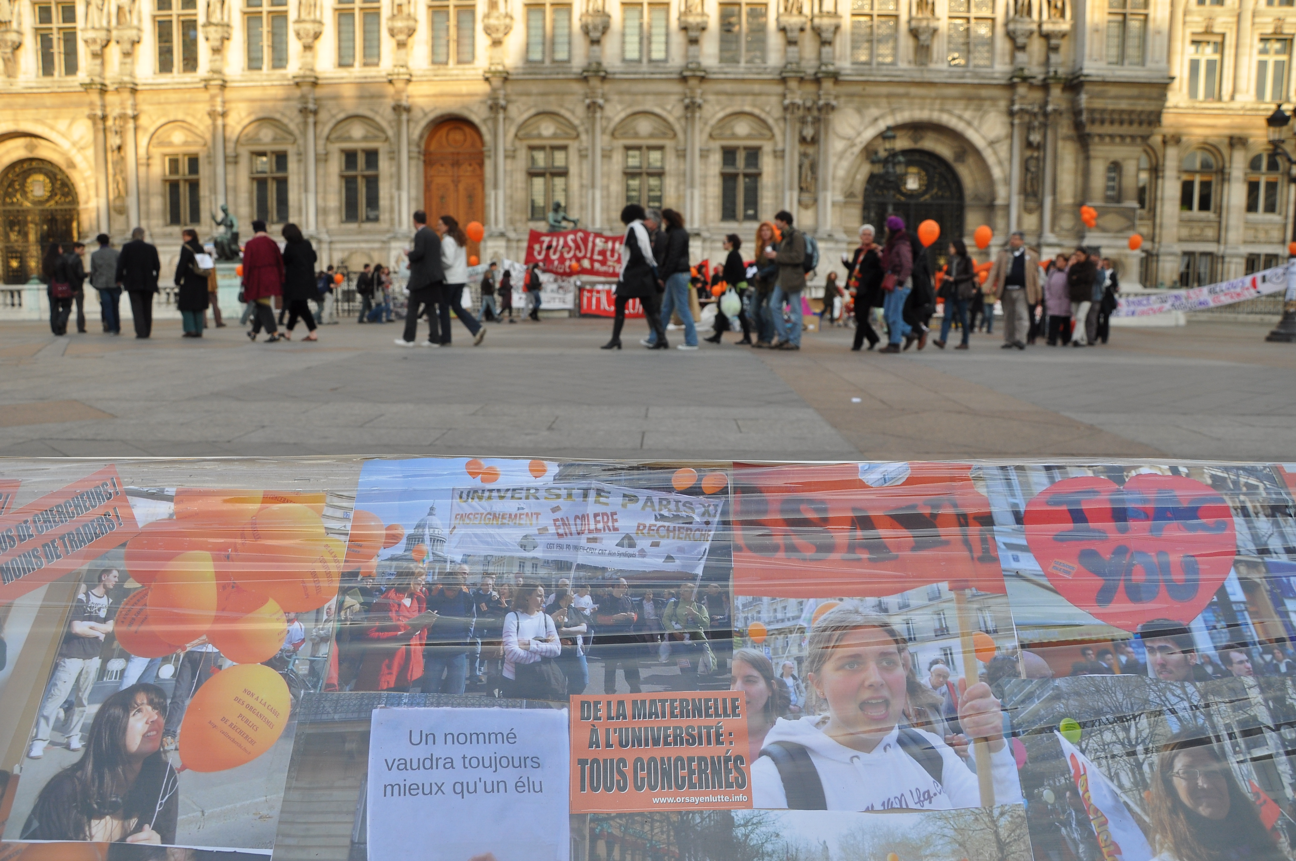 ronde